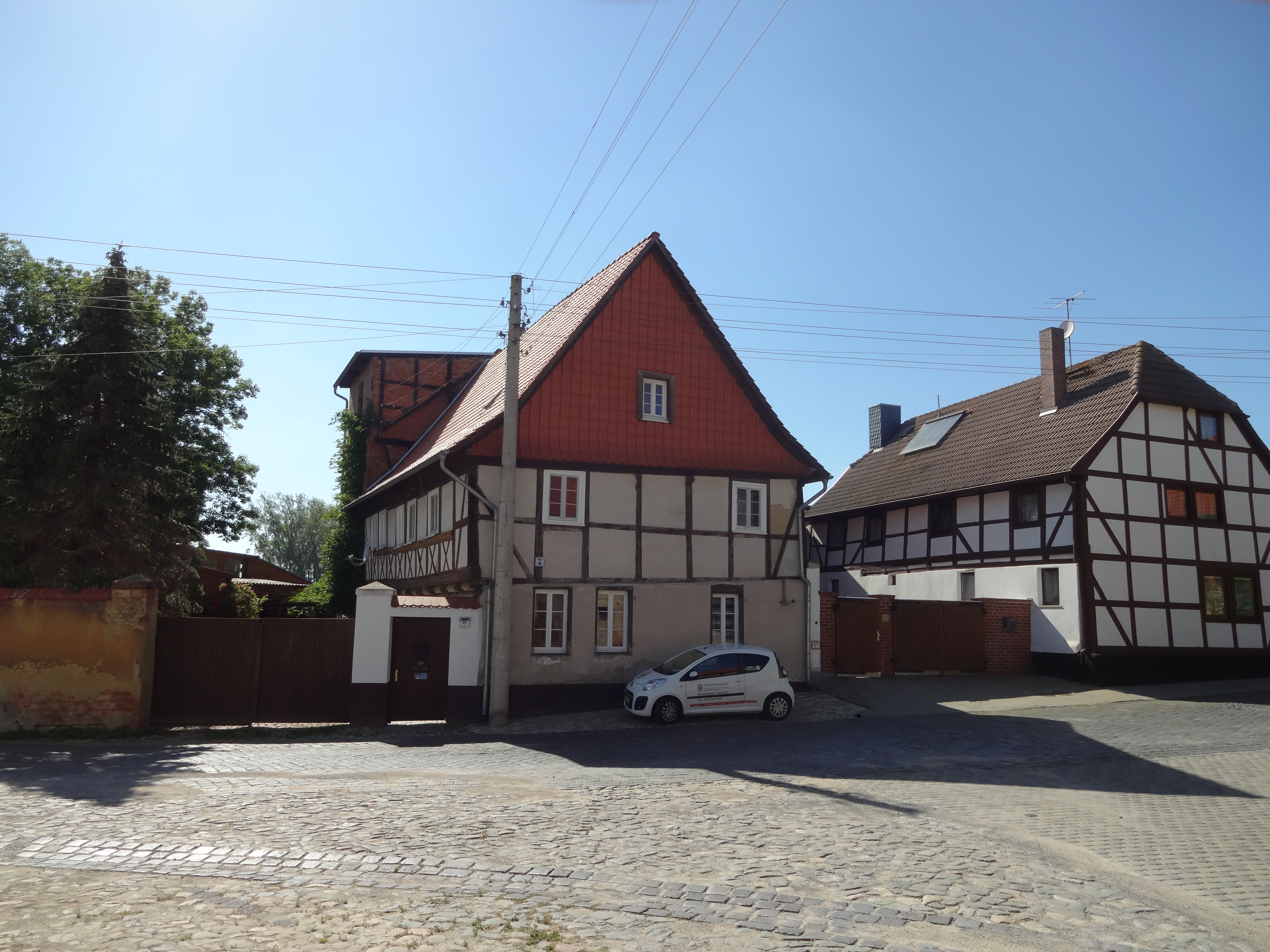 denkmalgeschütztes Bauernhaus in der Halberstädter Straße 21 und 23 in Harsleben